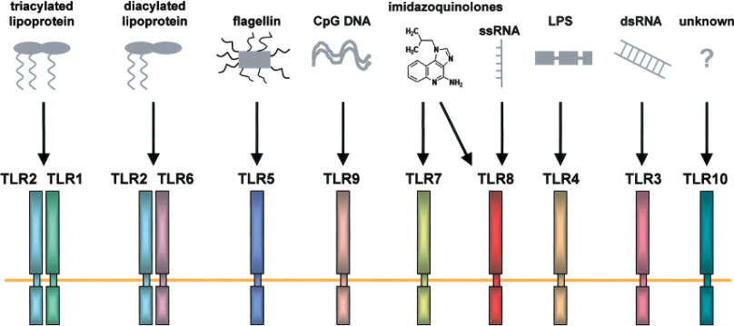 Tipus de Toll like receptors